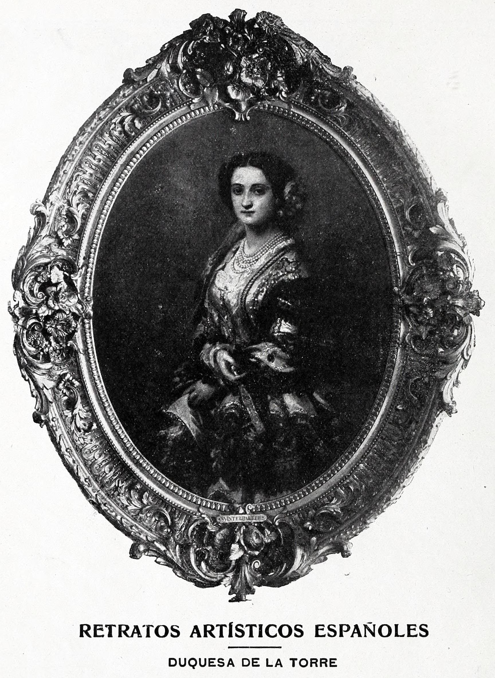 Retratos artísticos españoles.—Duquesa de la Torre.